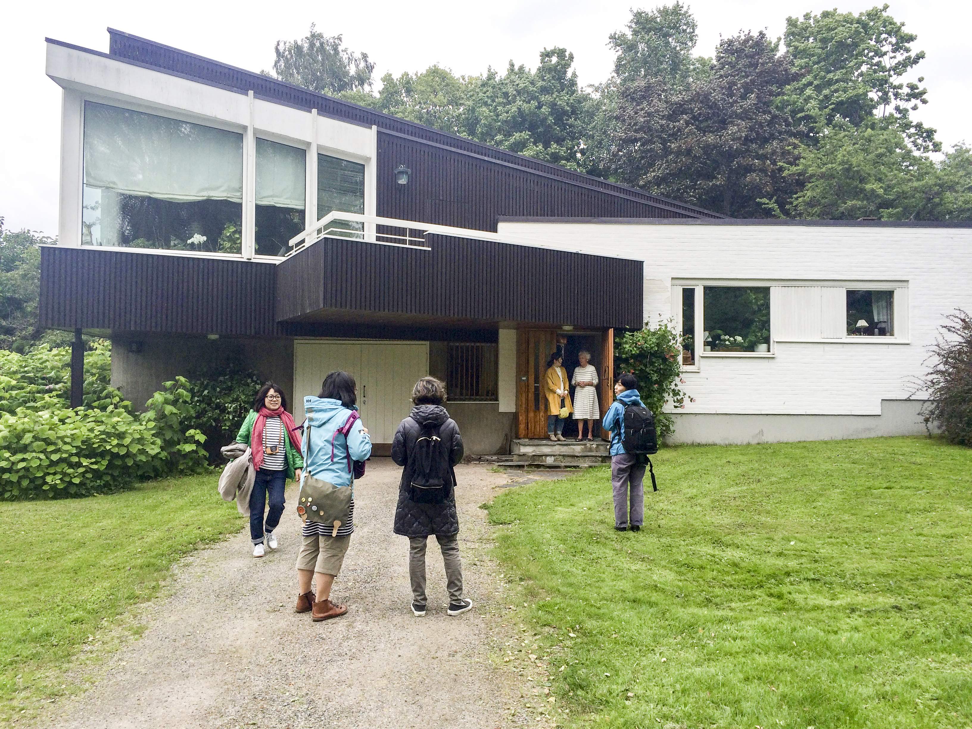 Ett japanskt team hälsar på Christine Schildt i Villa Skeppet.